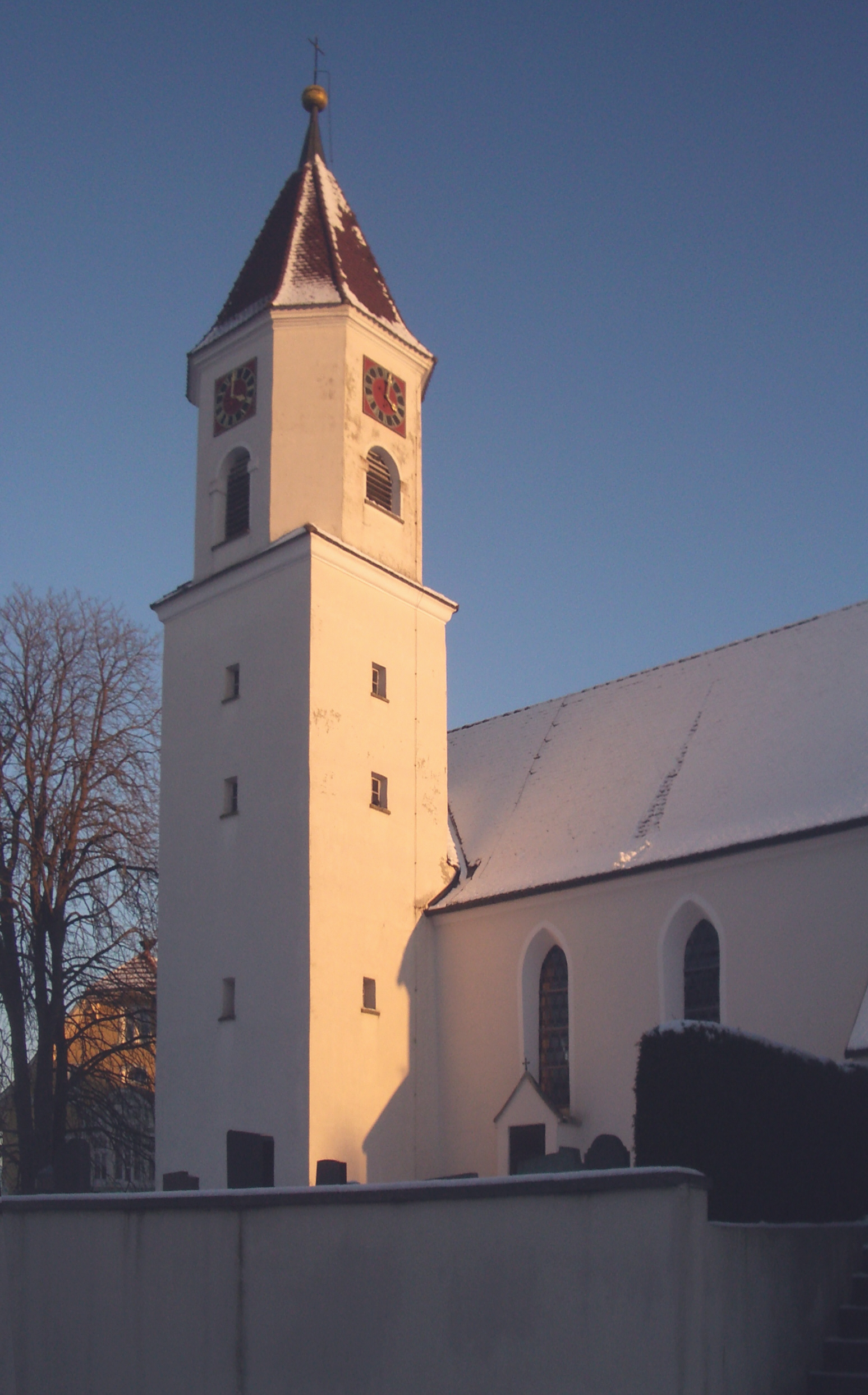 Unterwaldhausen, Landkreis Ravensburg: Katholische Pfarrkirche Allerheiligen, Turm